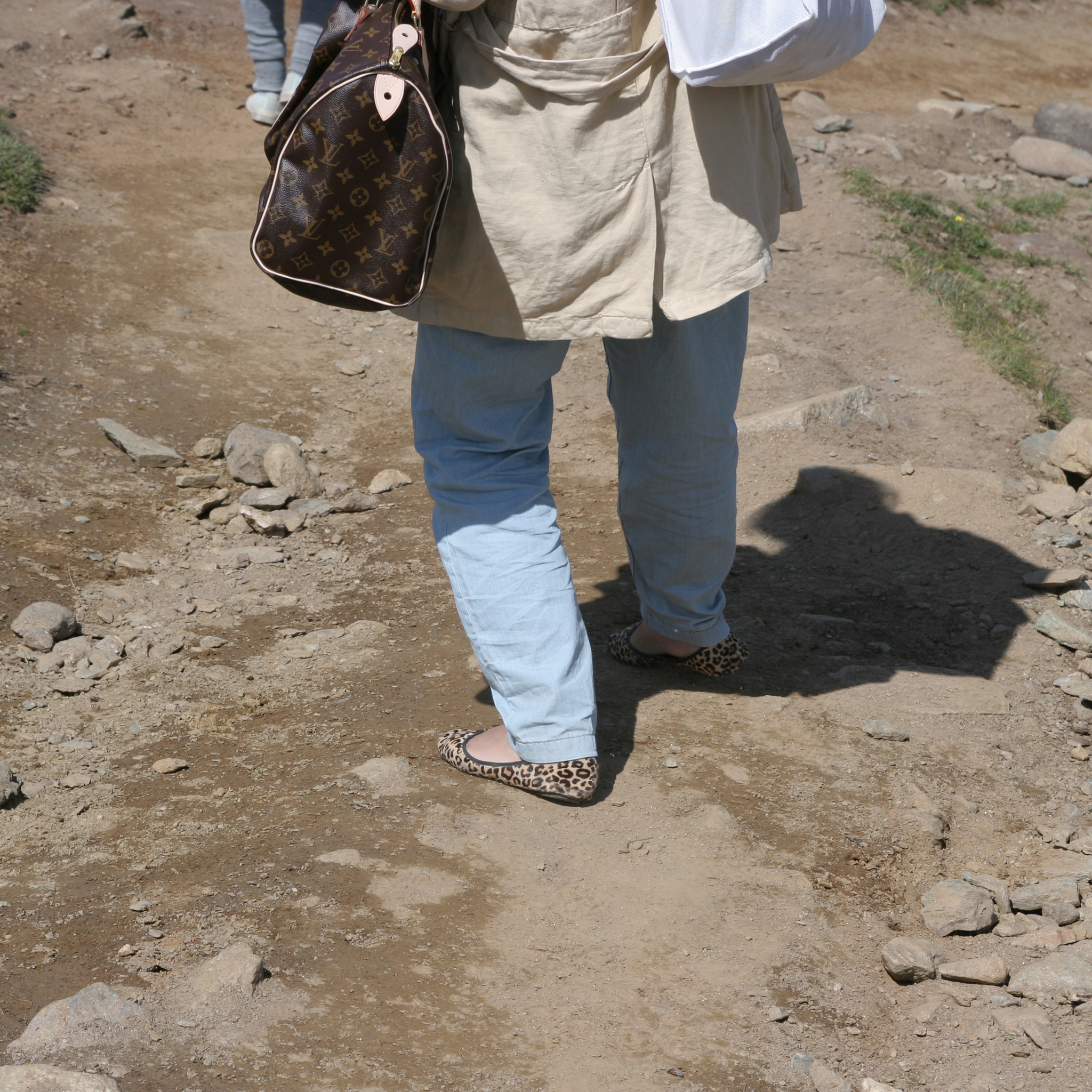 Halbschuhtouristin beim Abstieg vom Gornergrat, zwischen Rotenboden und Riffelberg auf ca. 2'700 m Höhe über NN.